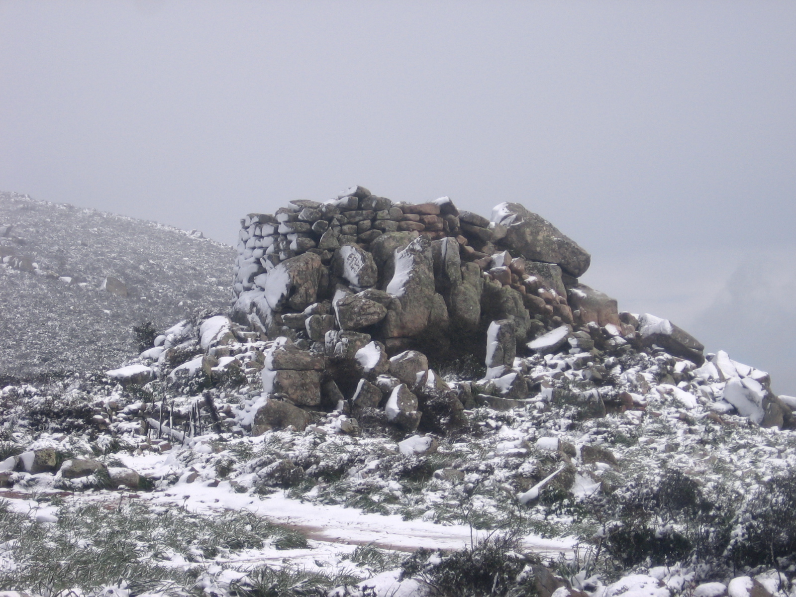 Andrea Zedda, Nuraghe di Monte Cresia (Sinnai(CA)) sotto la neve,CC